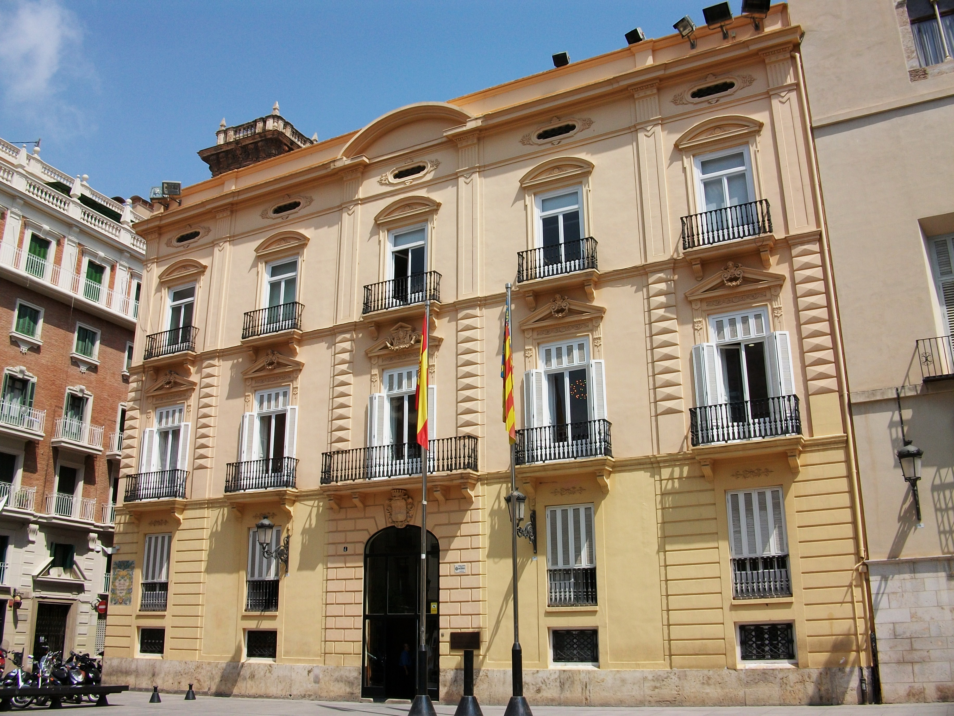 Palau de la Batllia o dels Jàudenes, València.